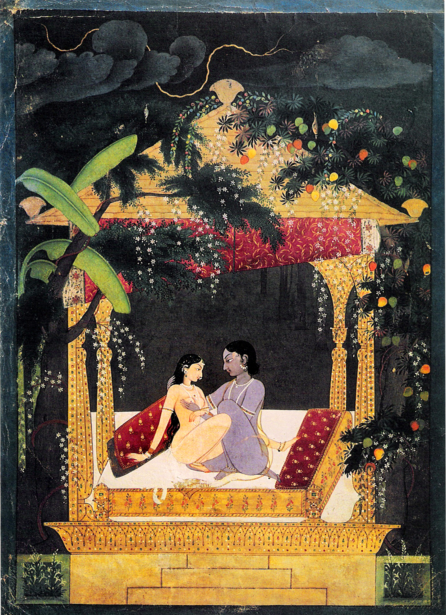 Krishna et Radha dans un pavillon